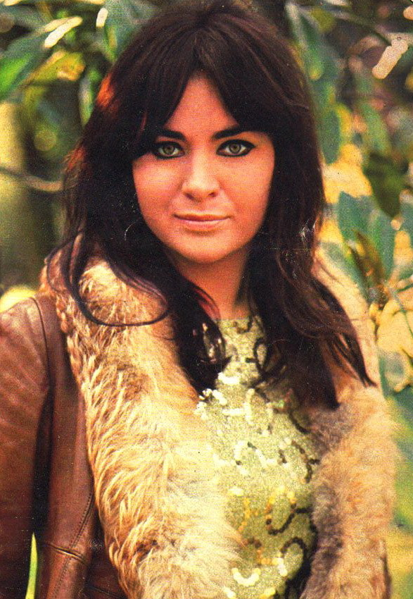 Italian actress Gabriella Giorgelli